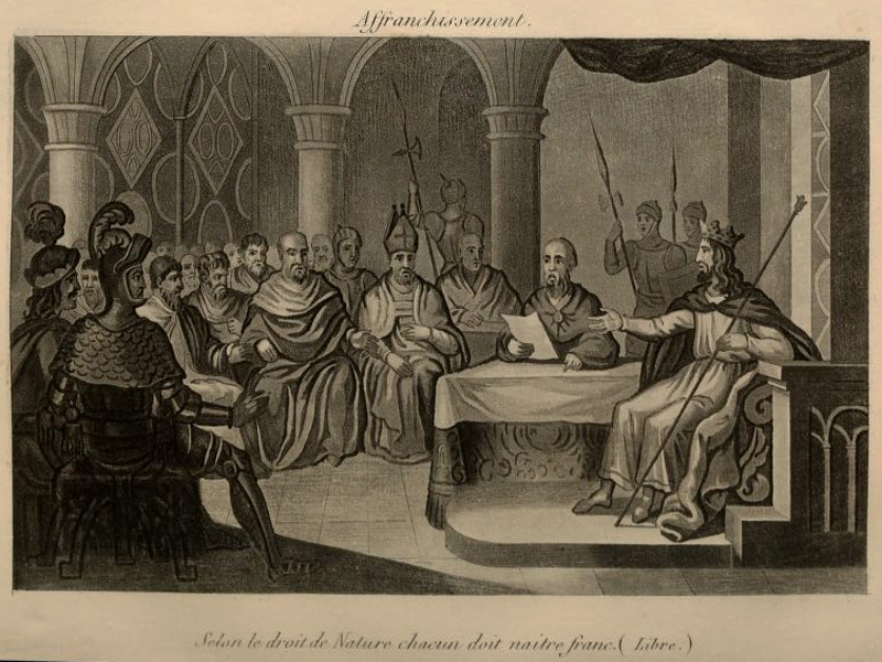 Illustration de l'ouvrage Edme-Théodore Bourg, Dictionnaire de la pénalité dans toutes les parties du monde connu : Tableau historique, chronologique et descriptif des Supplices, Tortures ou Questions ordinaires et extraordinaires, Tourmens, Peines corporelles et infamantes, Châtimens, Corrections, etc., et ordonnés par les Lois ou infligés par la cruauté ou le caprice, chez tous les peuples de la terre, tant anciens que modernes ; auxquels on a rattaché les Faits les plus importans que l'histoire présente en condamnations ou, exécutions civiles, correctionnelles ou criminelles, Paris, chez l'éditeur et Rousselon, 1824. "Selon le droit de Nature chacun doit naître franc" est extrait de l'édit du 3 juillet 1315 édicté par le roi de France Louis X.